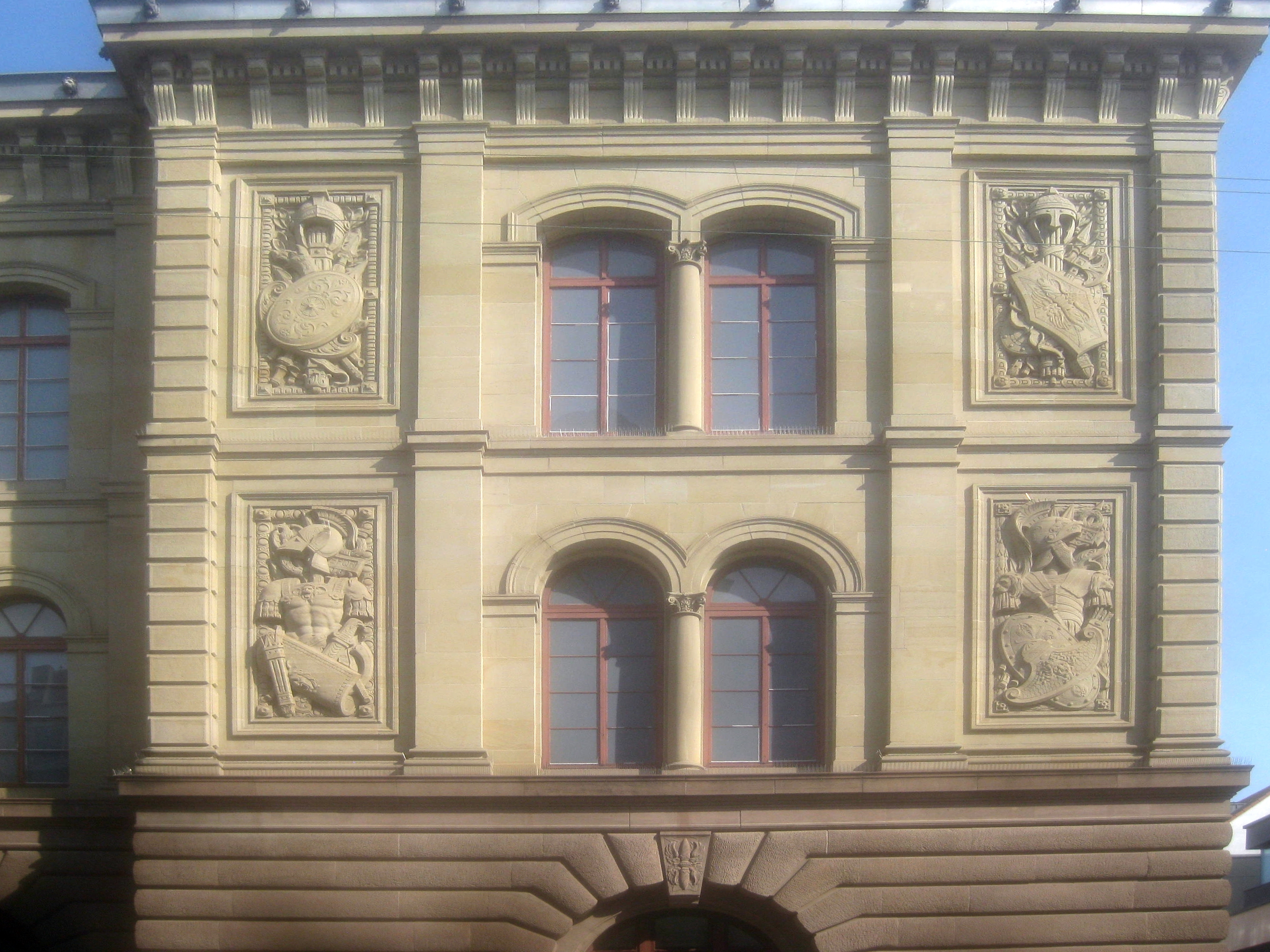 Rechter Eckrisalit der Südfassade des ehemaligen Zeughauses in Ludwigsburg, 1872–1874, jetzt Magazin des Staatsarchivs Ludwigsburg, Ludwigsburg, Mathildenstraße 1. - 4 Relieftafeln mit Trophäen. Schlussstein mit 2 geflügelten Patronen. Verzerrungen durch perspektivische Korrektur des Originalfotos File:Zeughaus Ludwigsburg, 007.jpg.